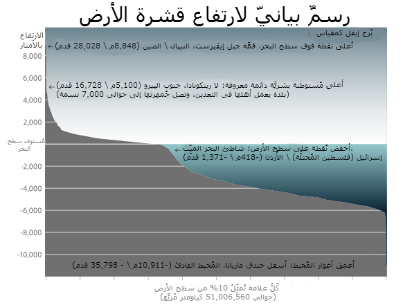 رسمٌ بيانيّ يُظهرُ ارتفاع قشرة الأرض.